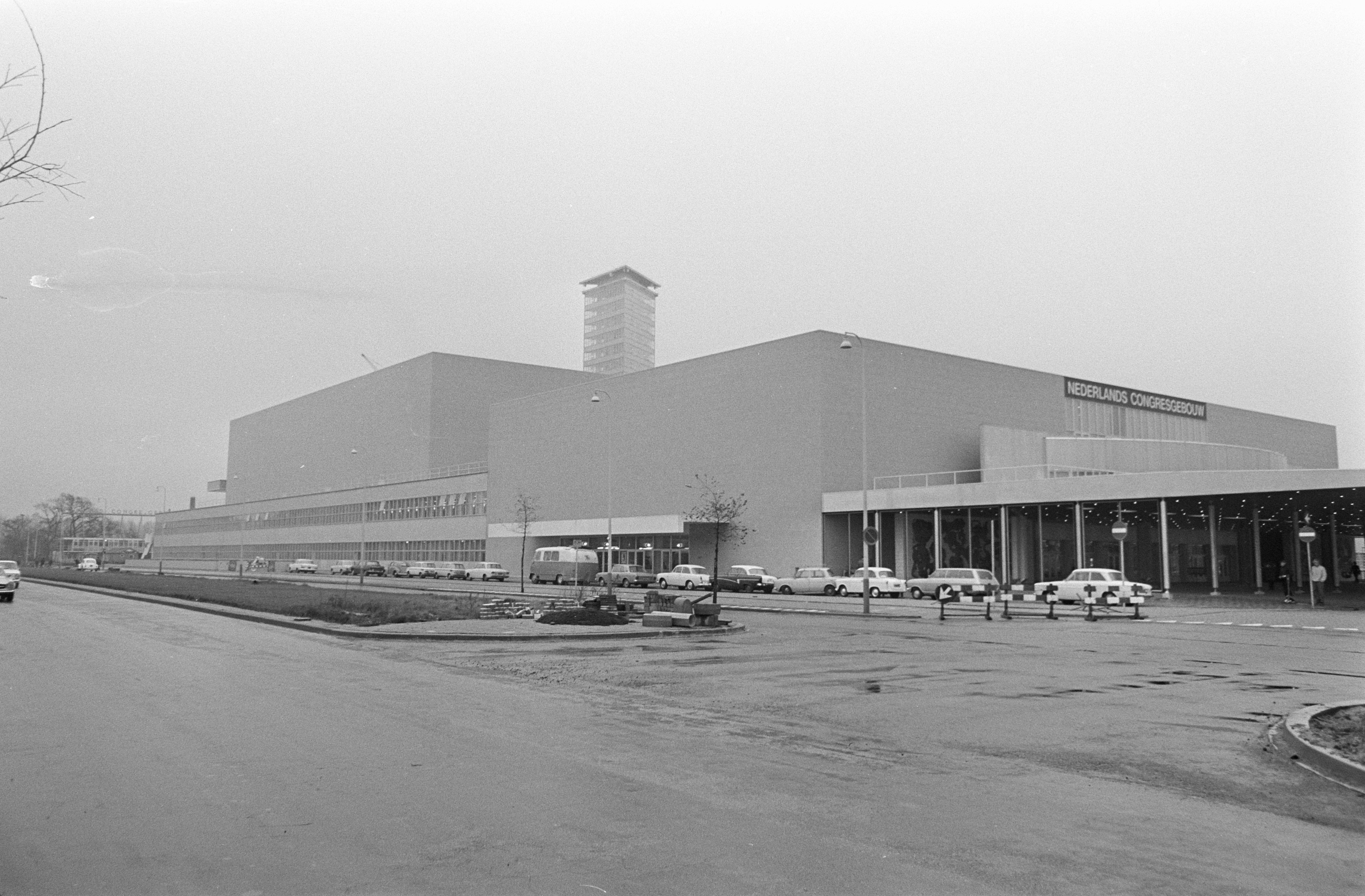 Collectie / Archief : Fotocollectie Anefo Reportage / Serie : [ onbekend ] Beschrijving : Congresgebouw Den Haag exterieur Datum : 19 november 1968 Locatie : Den Haag, Zuid-Holland Trefwoorden : congresgebouwen, exterieur Fotograaf : Nijs, Jac. de / Anefo Auteursrechthebbende : Nationaal Archief Materiaalsoort : Negatief (zwart/wit) Nummer archiefinventaris : bekijk toegang 2.24.01.05 Bestanddeelnummer : 921-8714